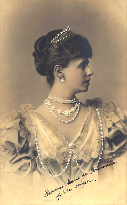 Prinzessin Marie von Sachsen-Coburg und Gotha (1875−1938), Königin von Rumänien, um 1900